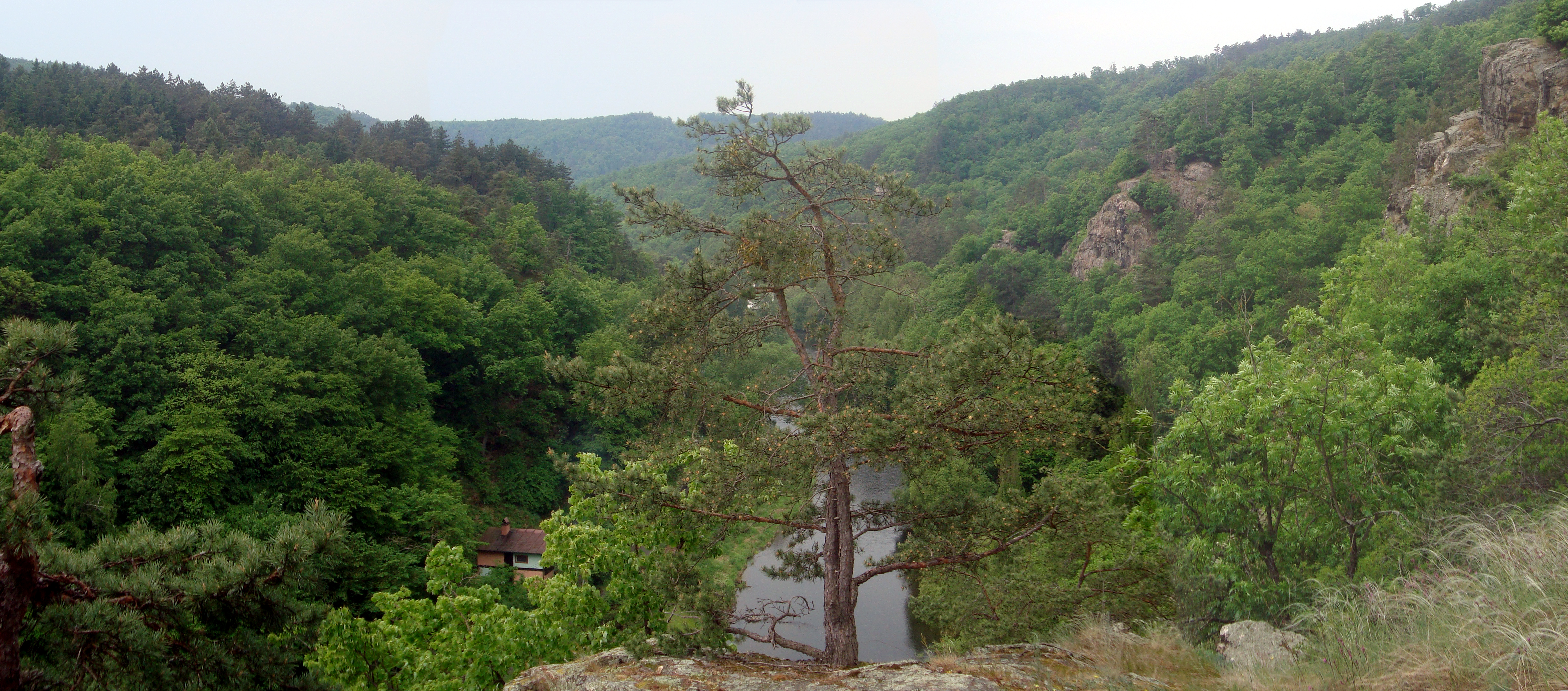 Výhled do údolí Jihlavy z levé strany břehu (Biskoupky)